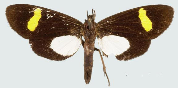 Proutiella esoterica